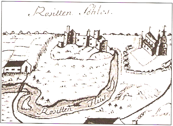 Räisaku ordulinnus XVIII sajandil.